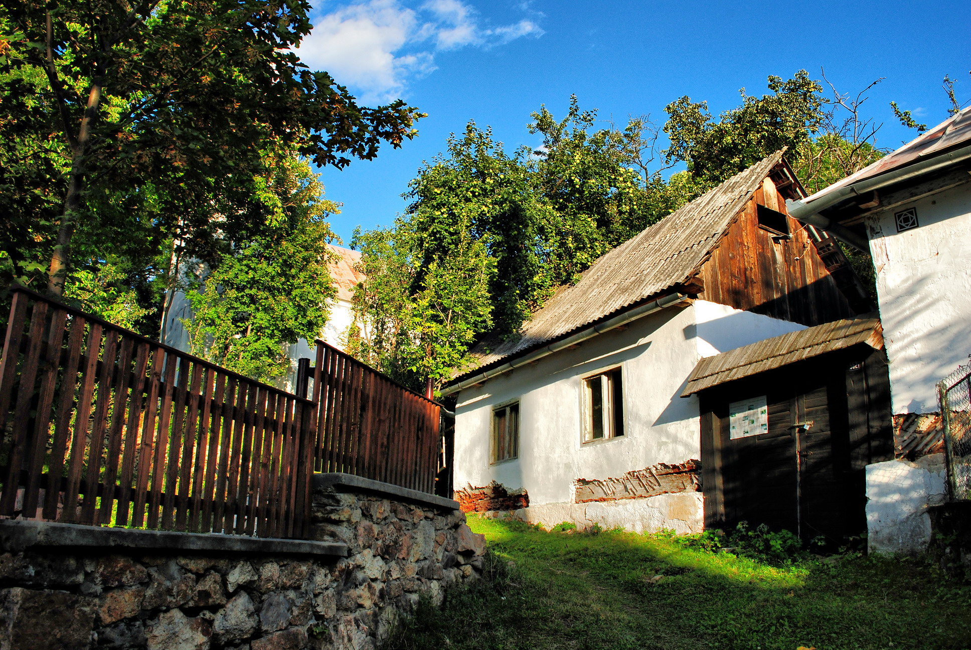 Casă nr. 552